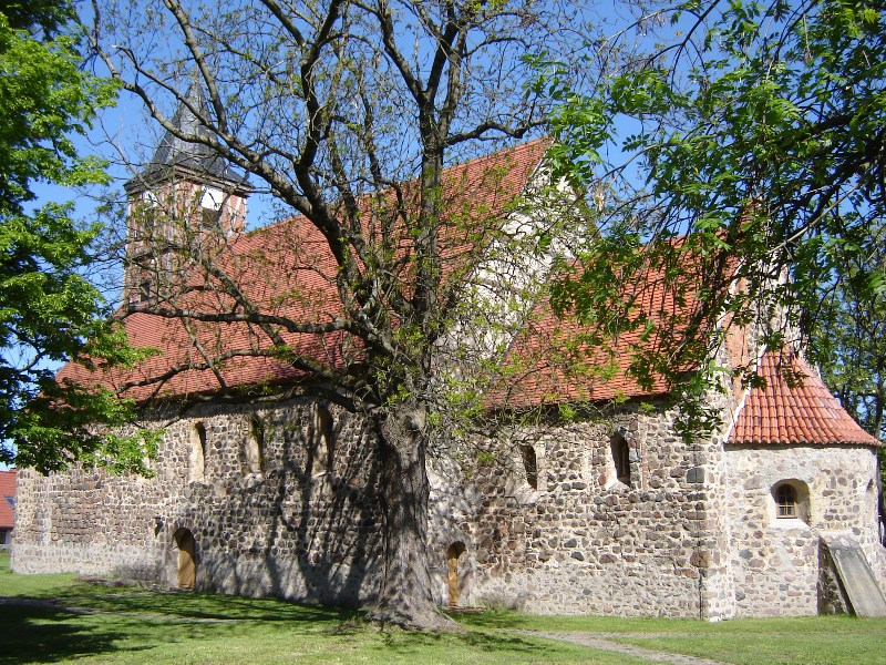 Grabow (Fläming), Kirche